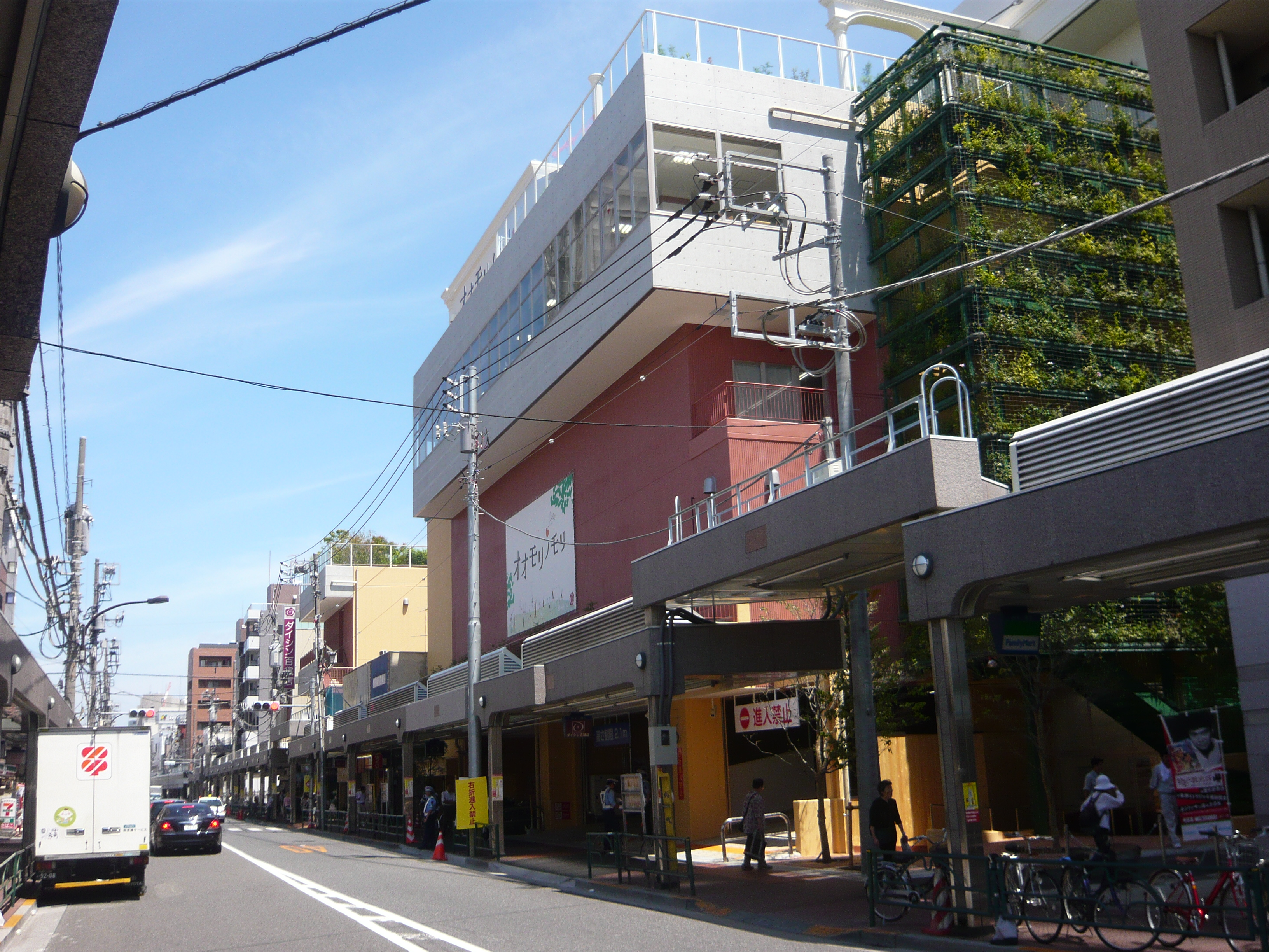 ダイシン百貨店本店（2012年8月4日グランドオープン）